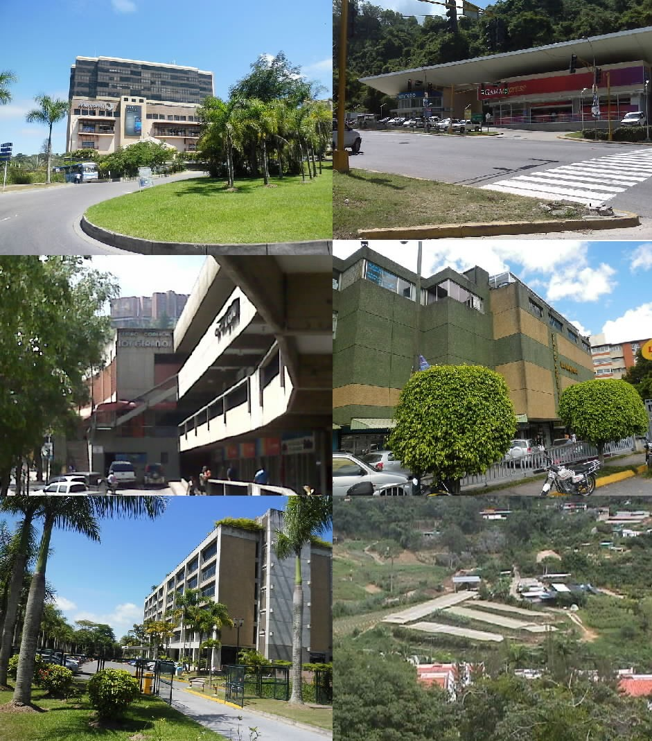 Imágenes Centro Comercial Paseo El Hatillo (La Lagunita - El Hatillo) Express La Boyera (La Boyera) Centro Comercial Los Geraneos (La Boyera) Centro Comercial La Boyera (Los Pinos 1) Centro empresarial La Lagunita (La Lagunita - El Hatillo) Zonas agricolas en la Boyera